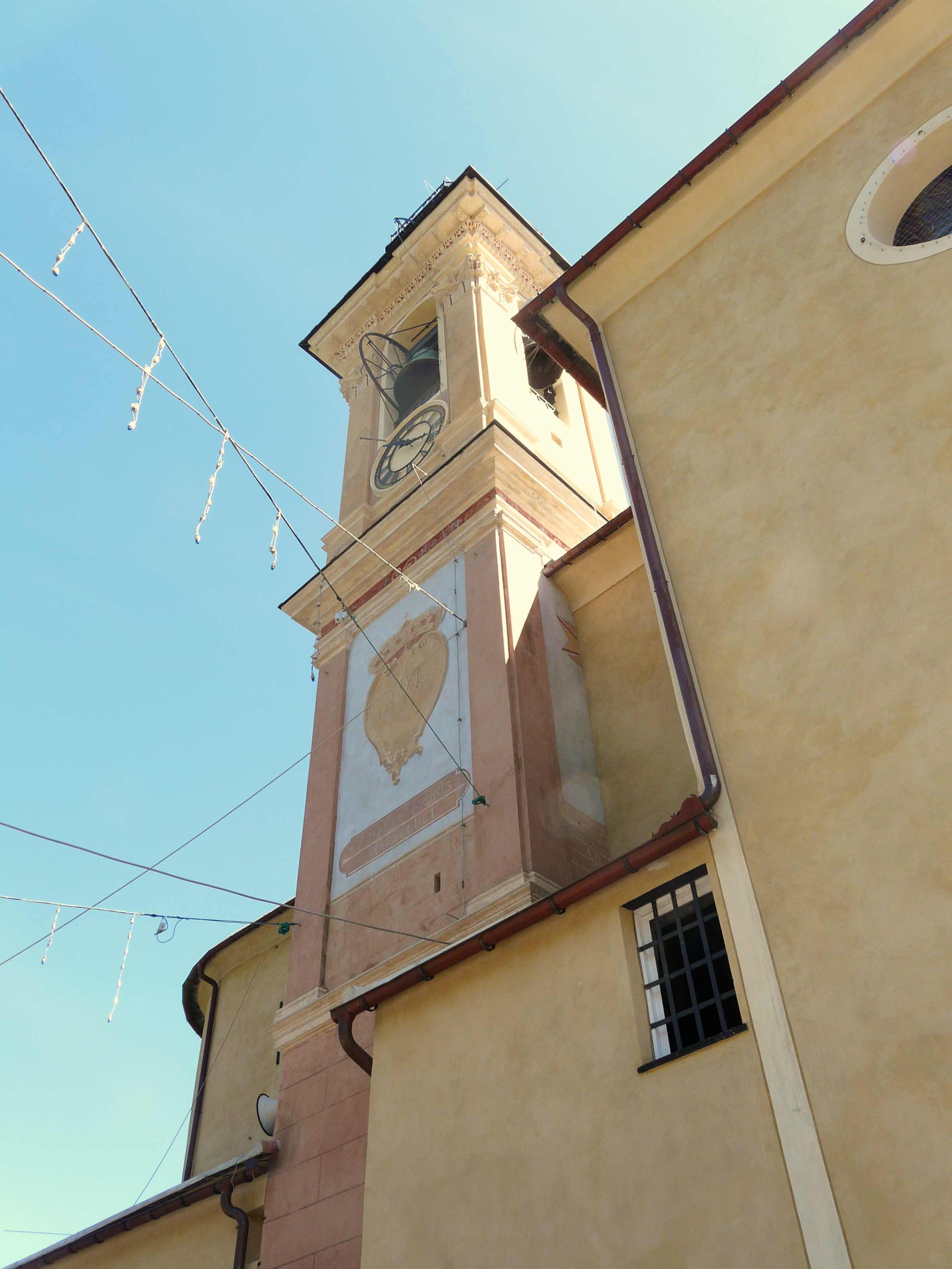 Chiesa di Santa Maria Assunta, Canepa, Sori, Liguria, Italia